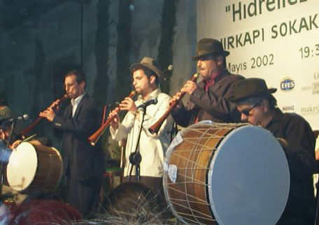 Groupe de musiciens tziganes jouant de la zurna et du davul à İstanbul pendant la fête de Hıdrellez en mai 2002. Photographie personnelle libre de droits.